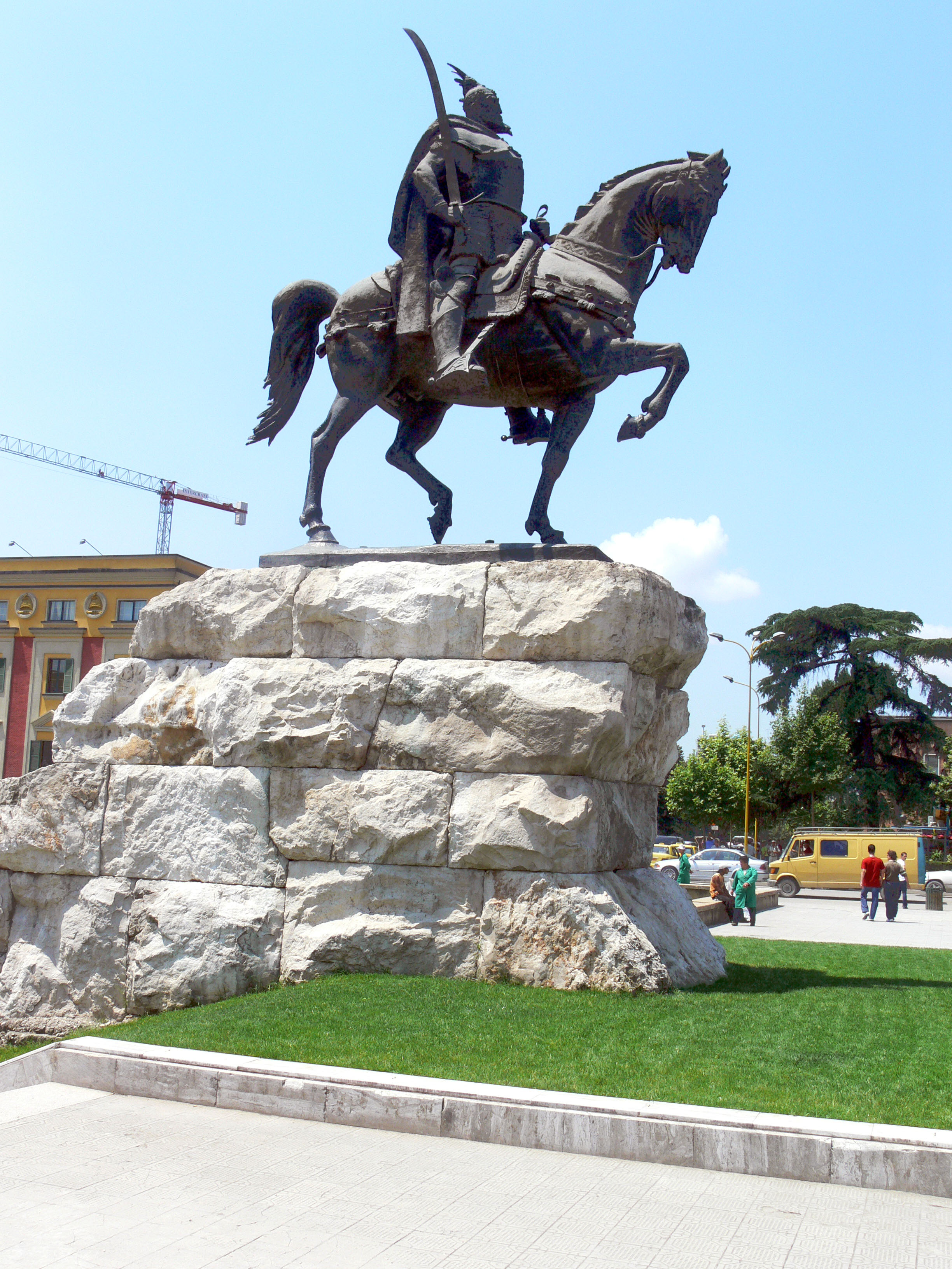 Tirana. Skanderbeg-Denkmal